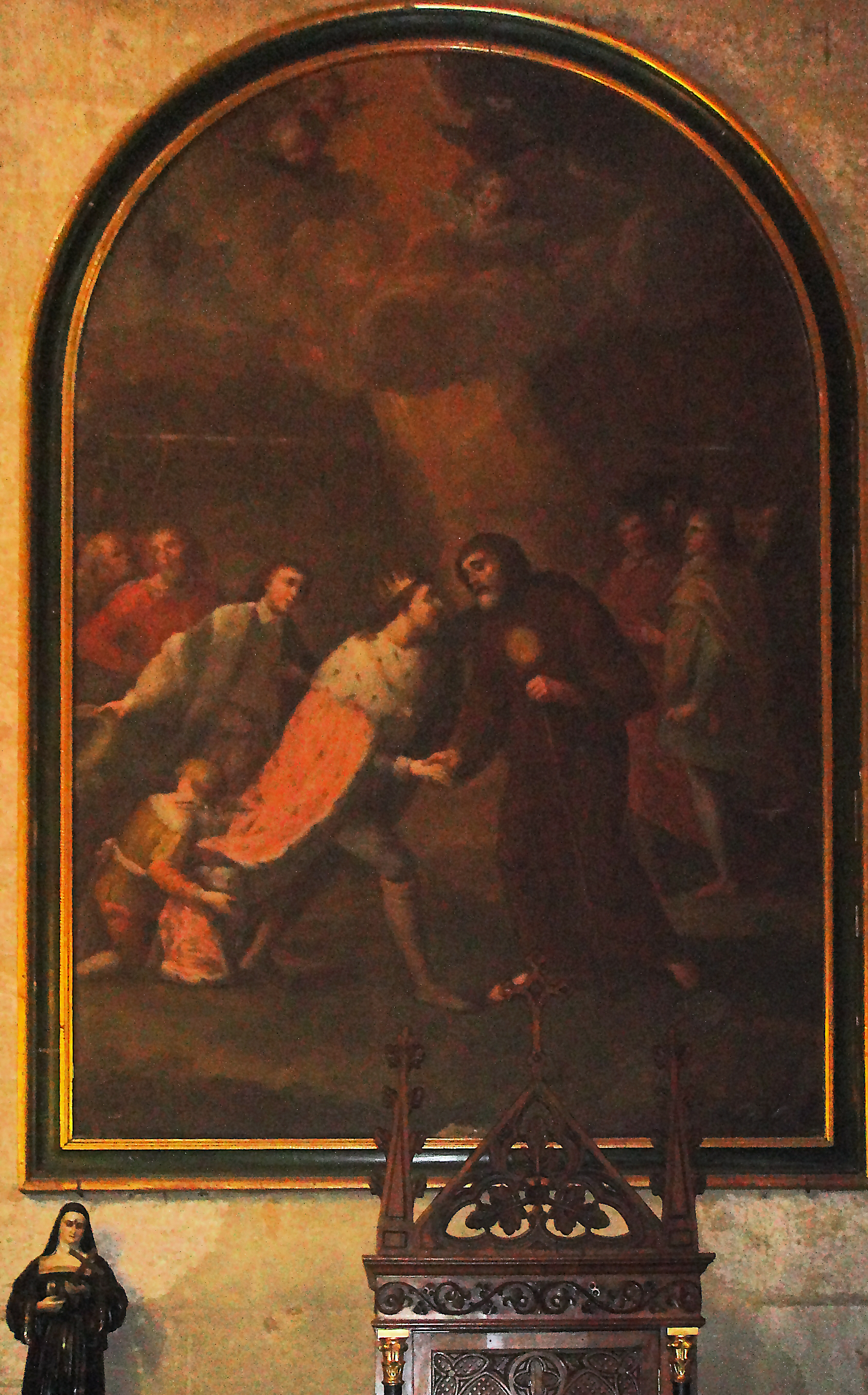 San Francisco de Paula y el rey Luis XI de Francia. Iglesia de San Nicolás de Córdoba.